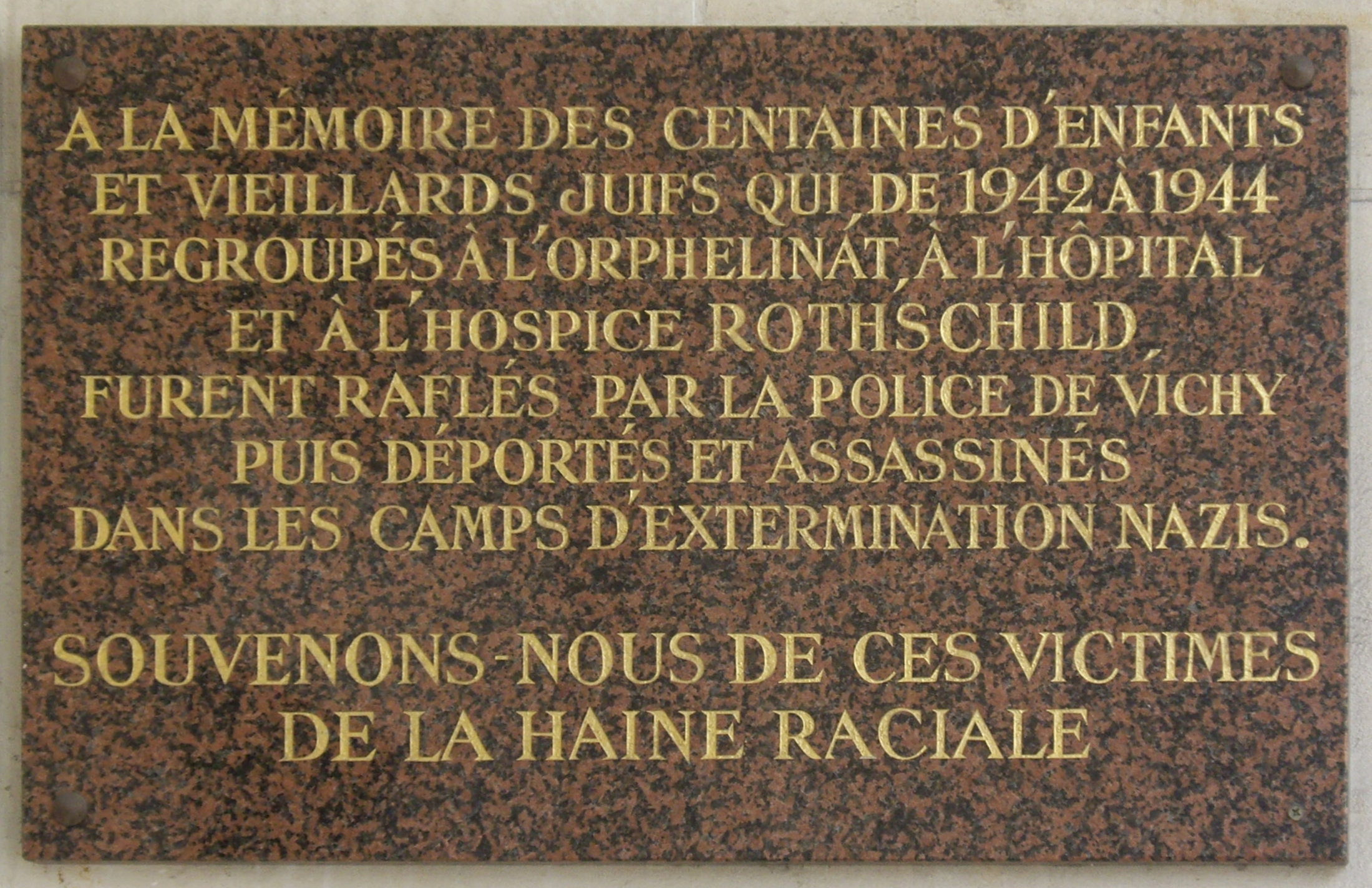 Plaque apposée à l'entrée la Fondation de Rothschild, 76 rue de Picpus, Paris 12e.« À la mémoire des centaines d'enfants et de vieillards juifs qui, de 1942 à 1944, regroupés à l'orphelinat, à l'hôpital et à l'hospice Rothschild, furent raflés par la police de Vichy, puis déportés et assassinés dans les camps d'extermination nazis. Souvenons-nous de ces victimes de la haine raciale. »